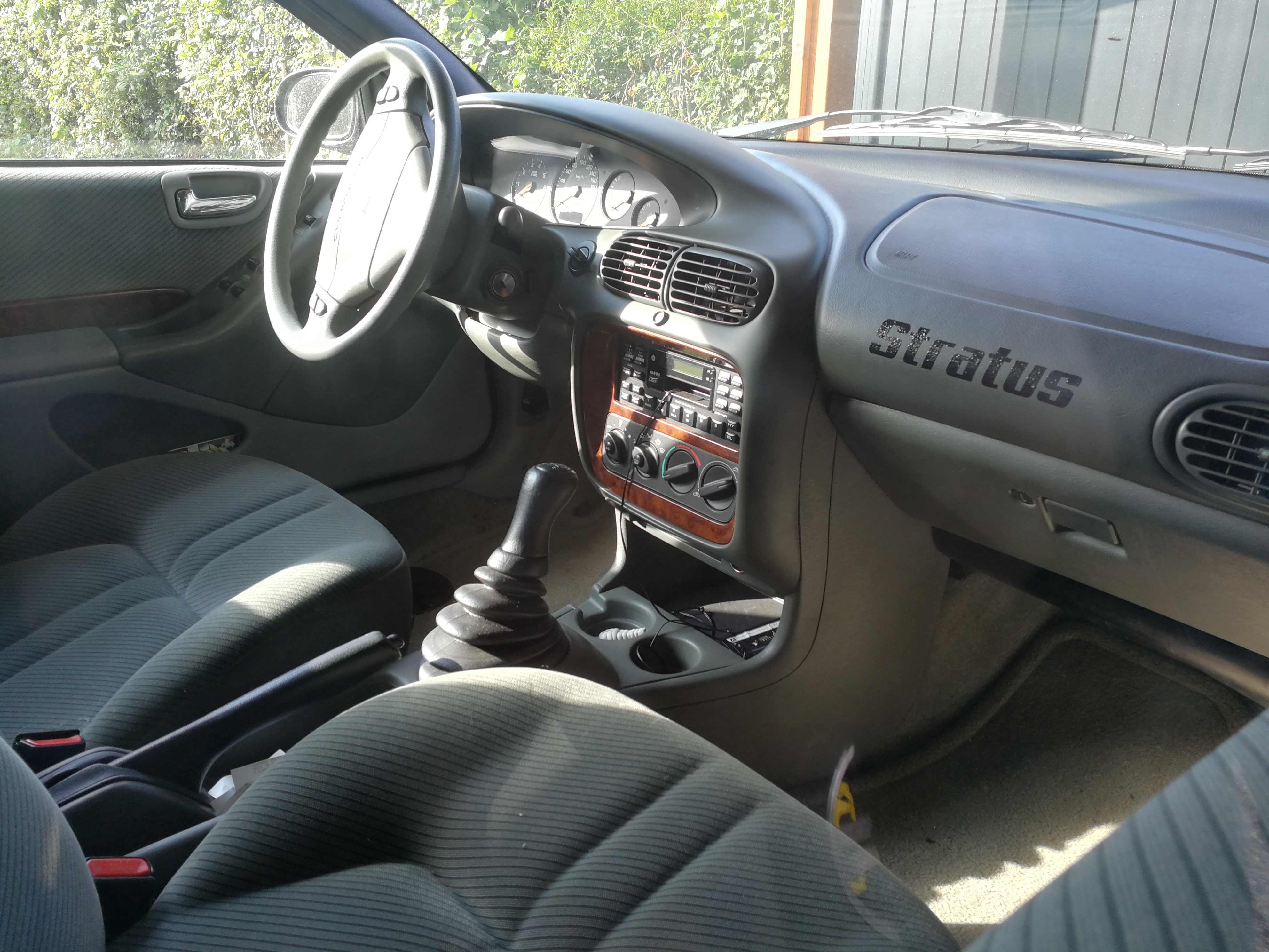 Vue intérieure de la Stratus.